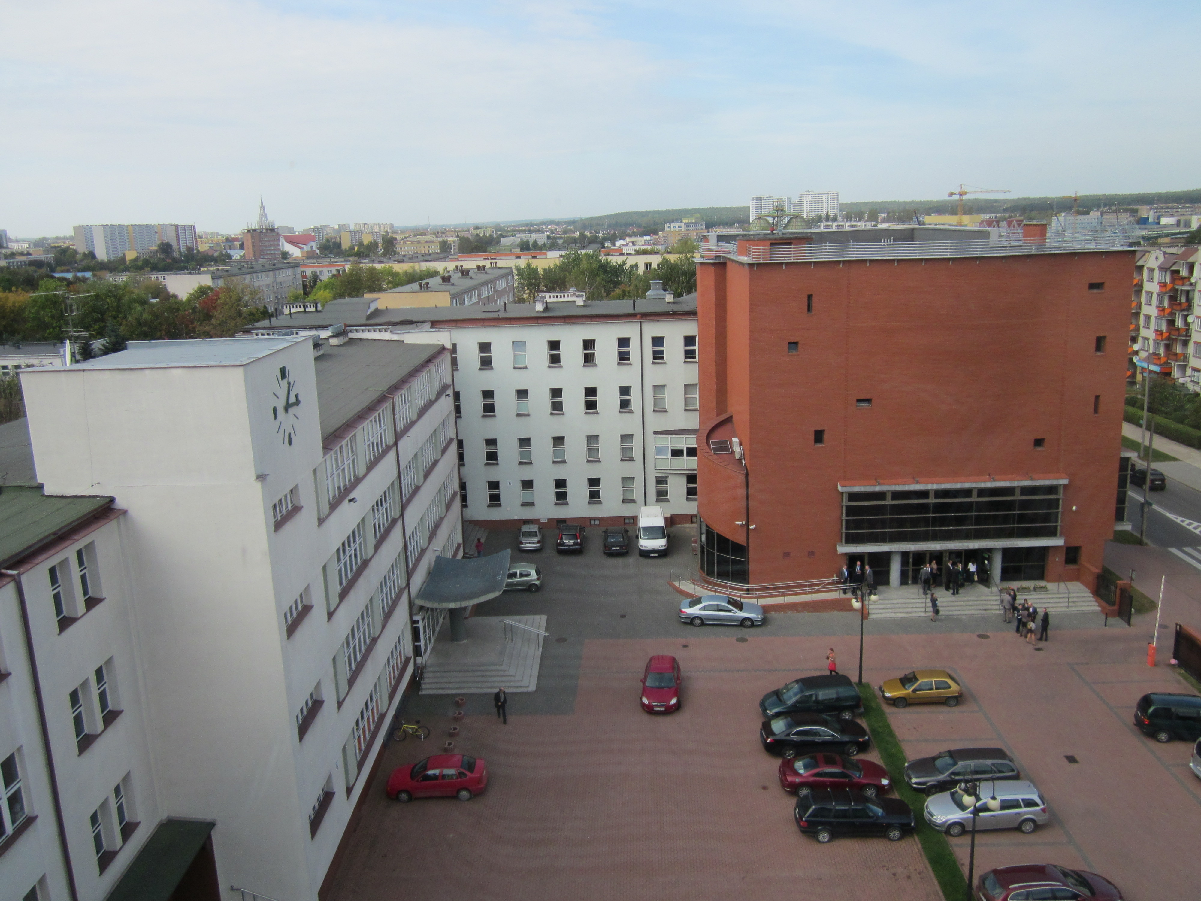 Siedziba Wyższej Szkoły Finansów i Zarządzania w Białymstoku znajduje się przy ul. Ciepłej 40. Jest to widok z najwyższego budynku uczelni, w oddali panorama miasta – osiedle Sienkiewicza.